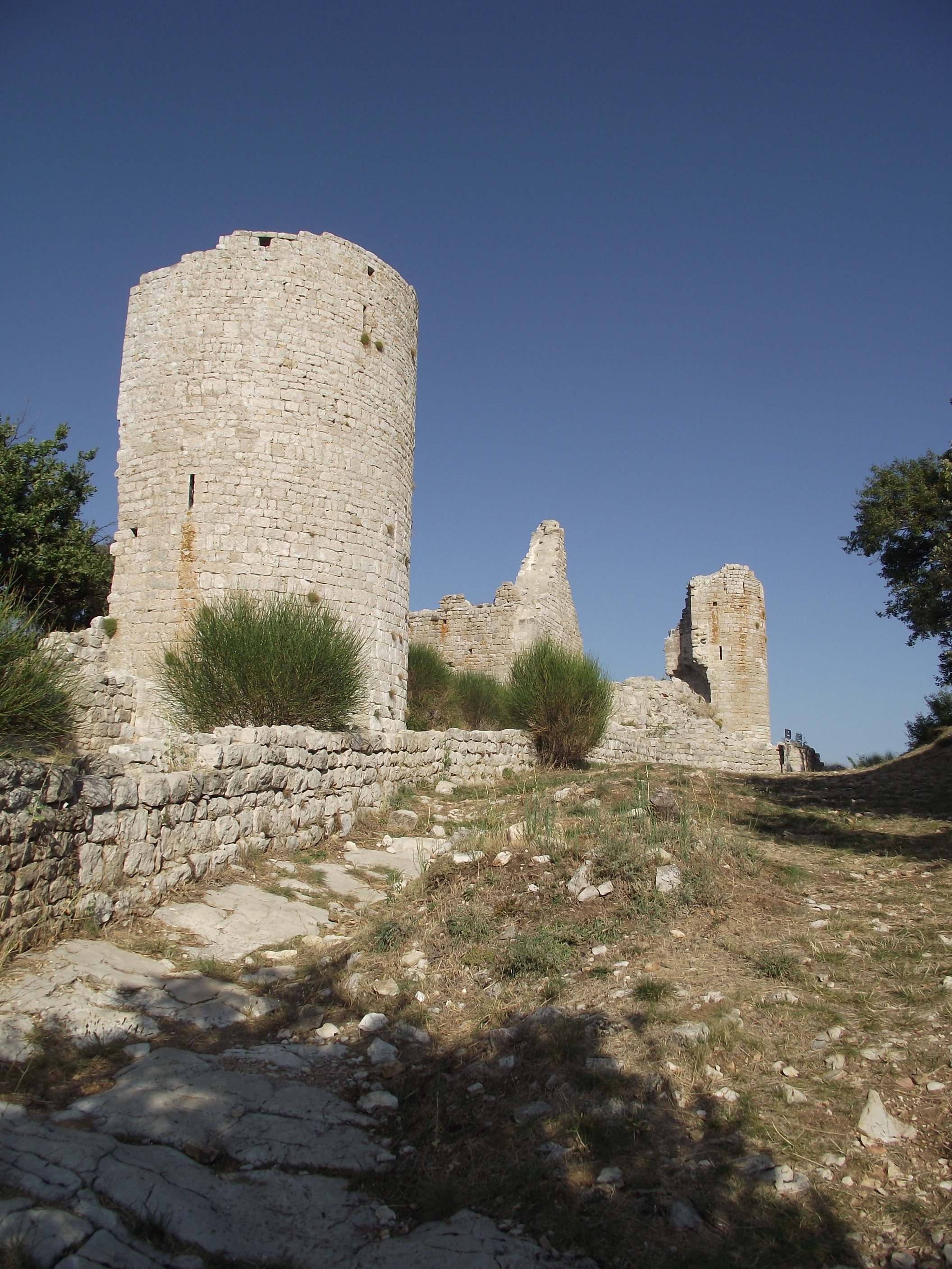 Une partie du château de Rougiers aujourd'hui en ruine.